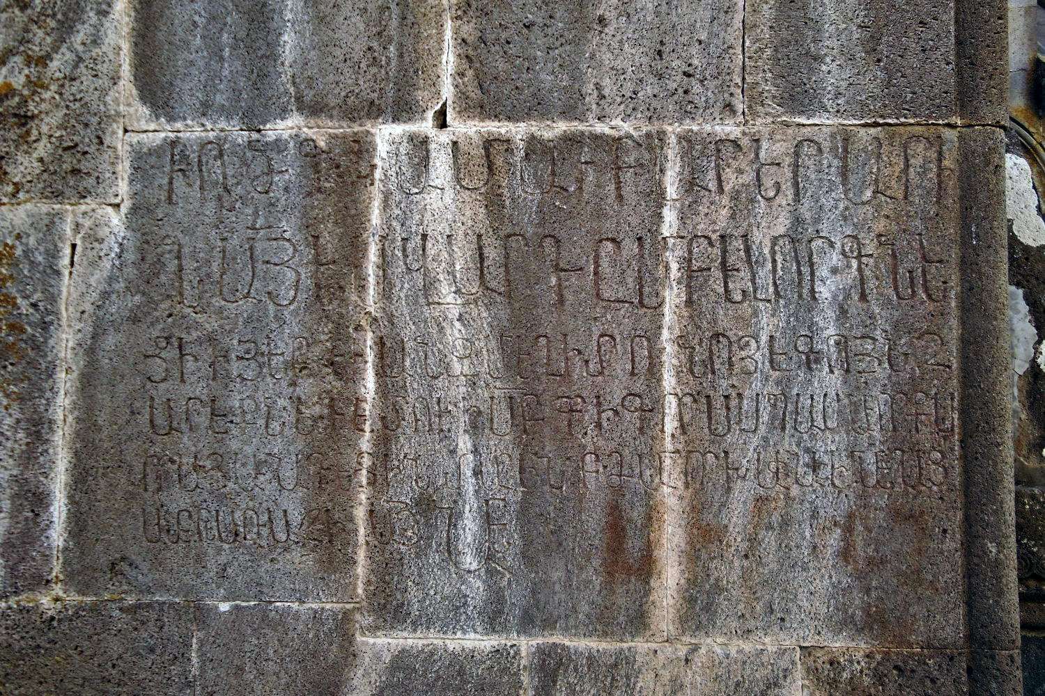 Надпись на стене церкви С. Ншан, Кечарис в Цахкадзоре